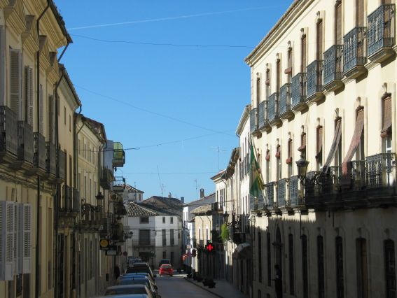 Calle de la feria